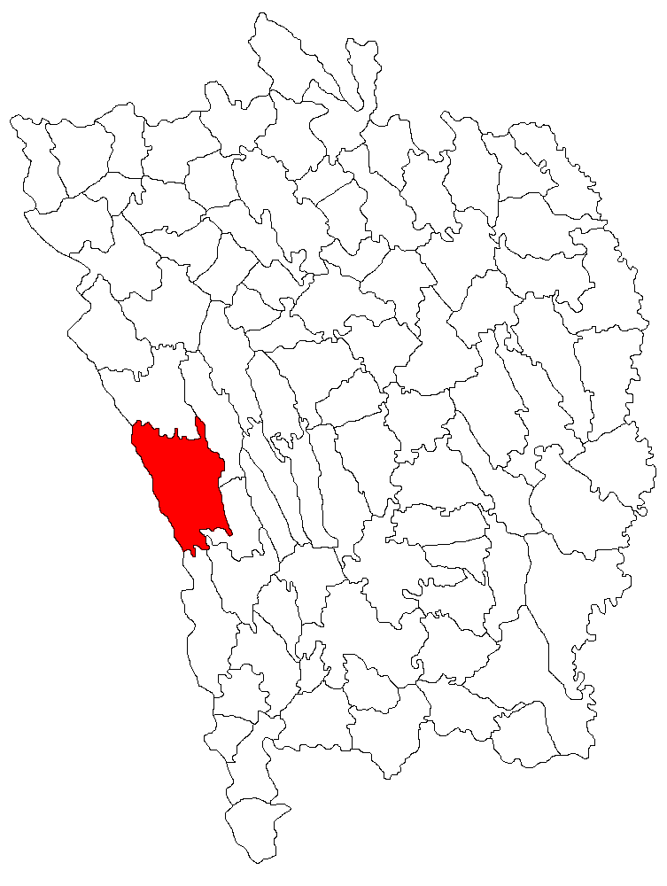 Categorie:Hărţi ale judeţului Vaslui